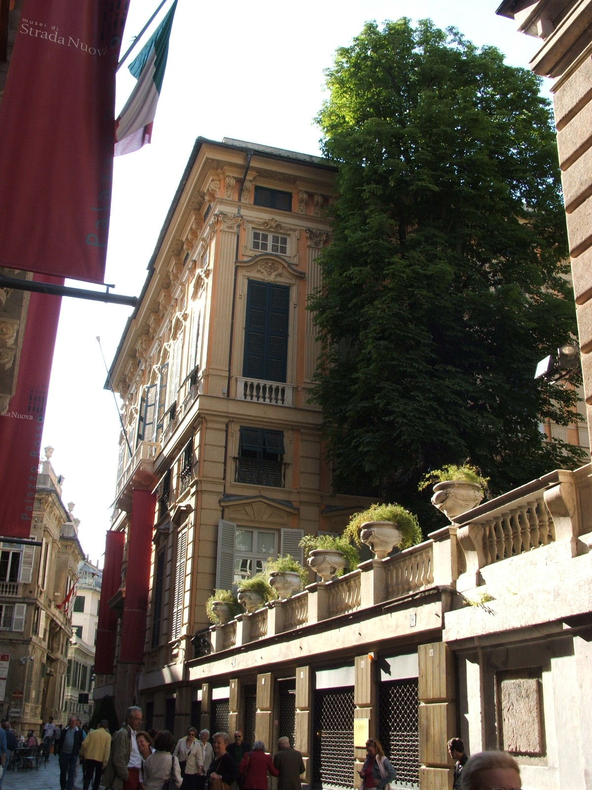 Genova, Via Garibaldi Palazzo Bianco e giardino pensile di ponente di Palazzo Doria Tursi